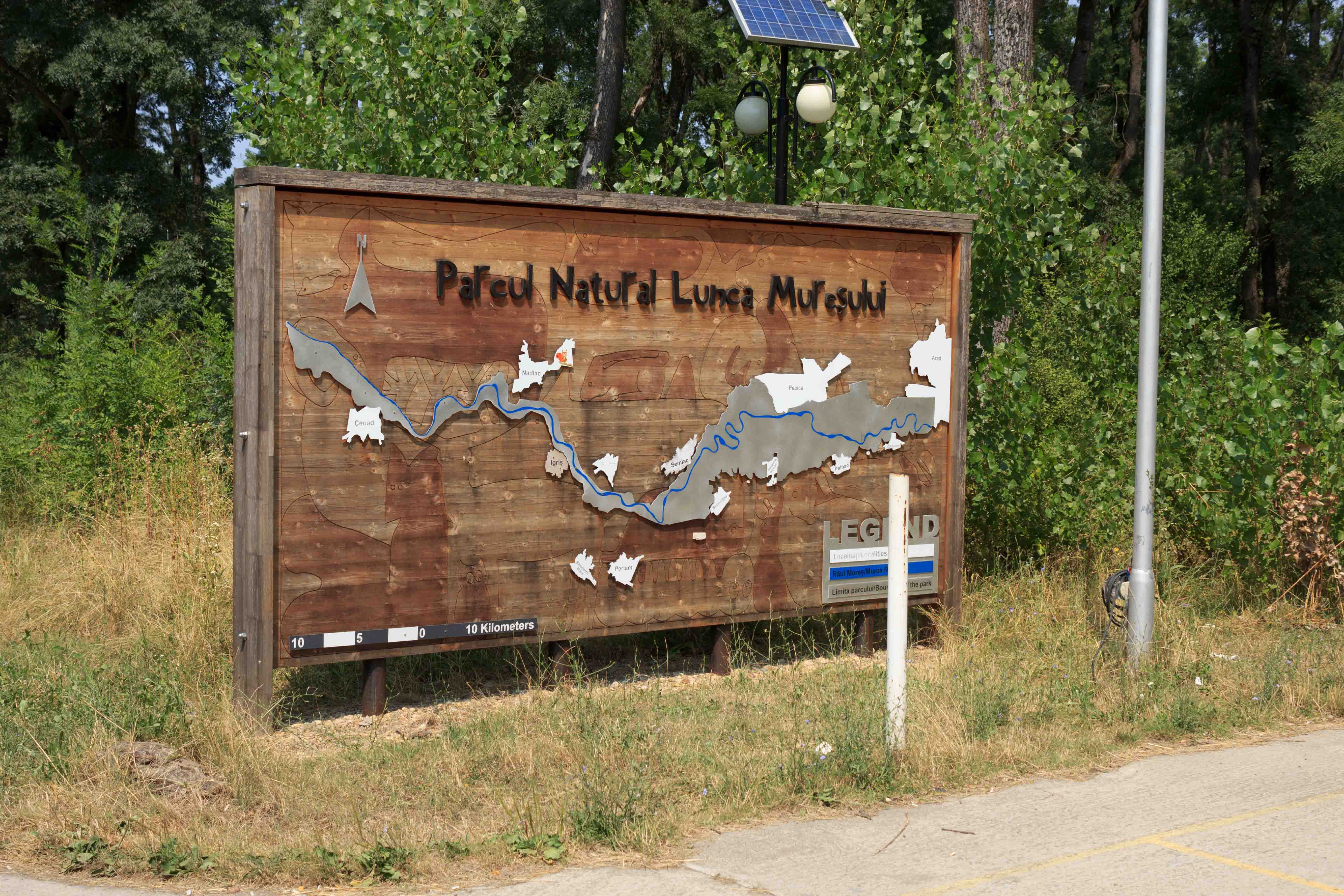 Entrada do Parque Natural Lunca Mureșului